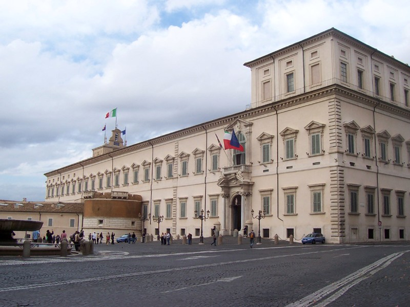 Roma - Palazzo del Quirinale